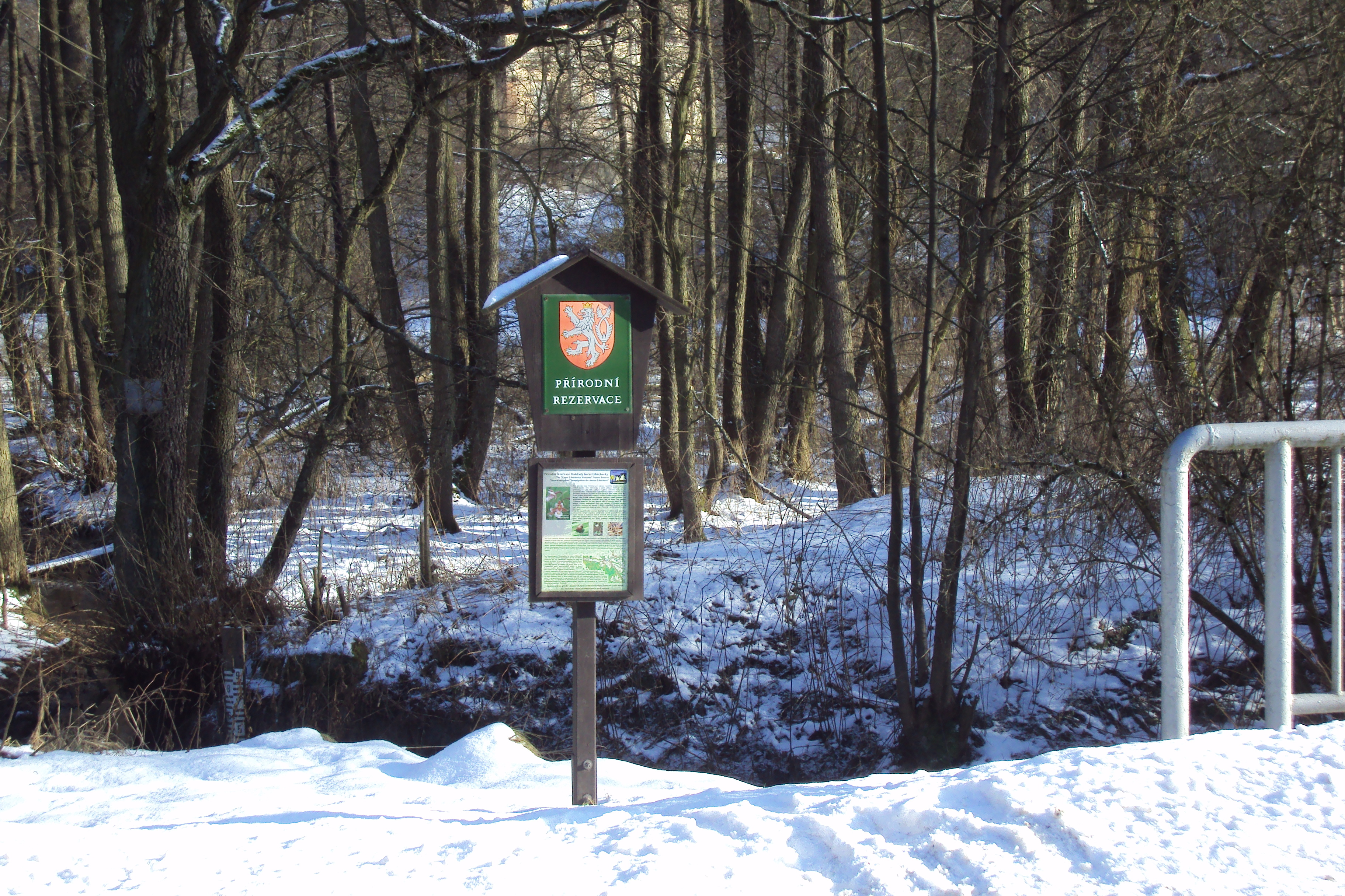 Přírodní rezervace Mokřady horní Liběchovky, její hranice v osadě Rozprechtice u Dubé